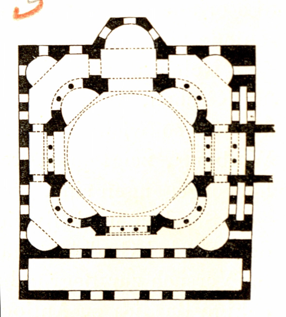 Zeichnung aus dem Jahrbuch der kaiserl. königl. Central-Commission zur Erforschung und Erhaltung der Baudenkmale III. 1859. 1-104. Zuordnung entsprechend Dateinamen August Ottmar Essenwein (1831–1892) Description German architect and writer Date of birth/death2 November 183113 October 1892Location of birth/deathKarlsruheNurembergAuthority control VIAF: 51804595 LCCN: n86016586 GND: 119022192 BnF: cb12551826g ULAN: 500014044 ISNI: 0000 0001 1062 3760 WorldCat WP-Person